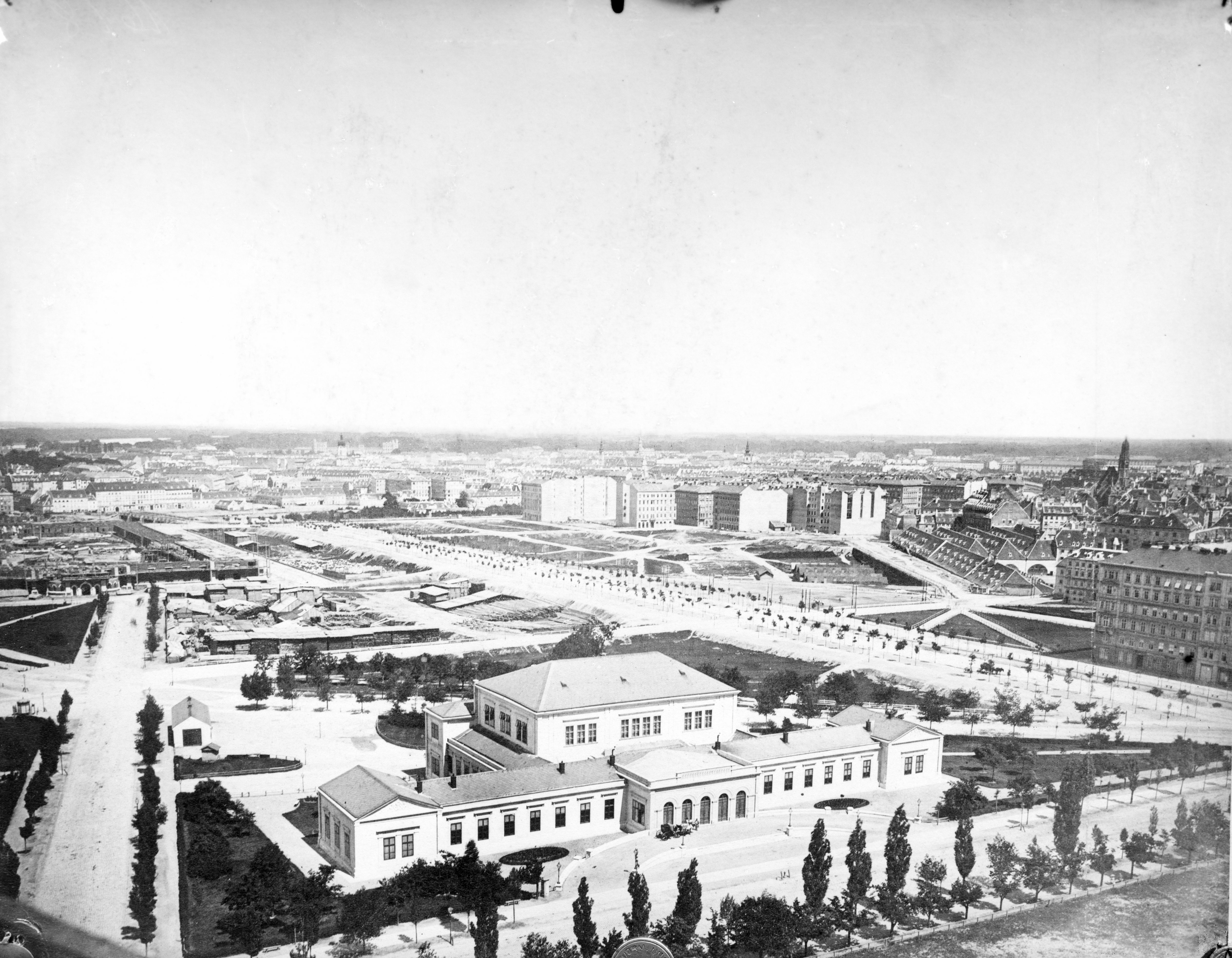 Gesamtansicht vom (alten) Abgeordnetenhaus von erhöhtem Standort (Votivkirche) über den eben trassierten Schottenring Richtung Leopoldstadt. Zwischen 1884 und 1885 wurde auf Währinger Straße 2–4 schon wieder der Maria-Theresienhof errichtet.